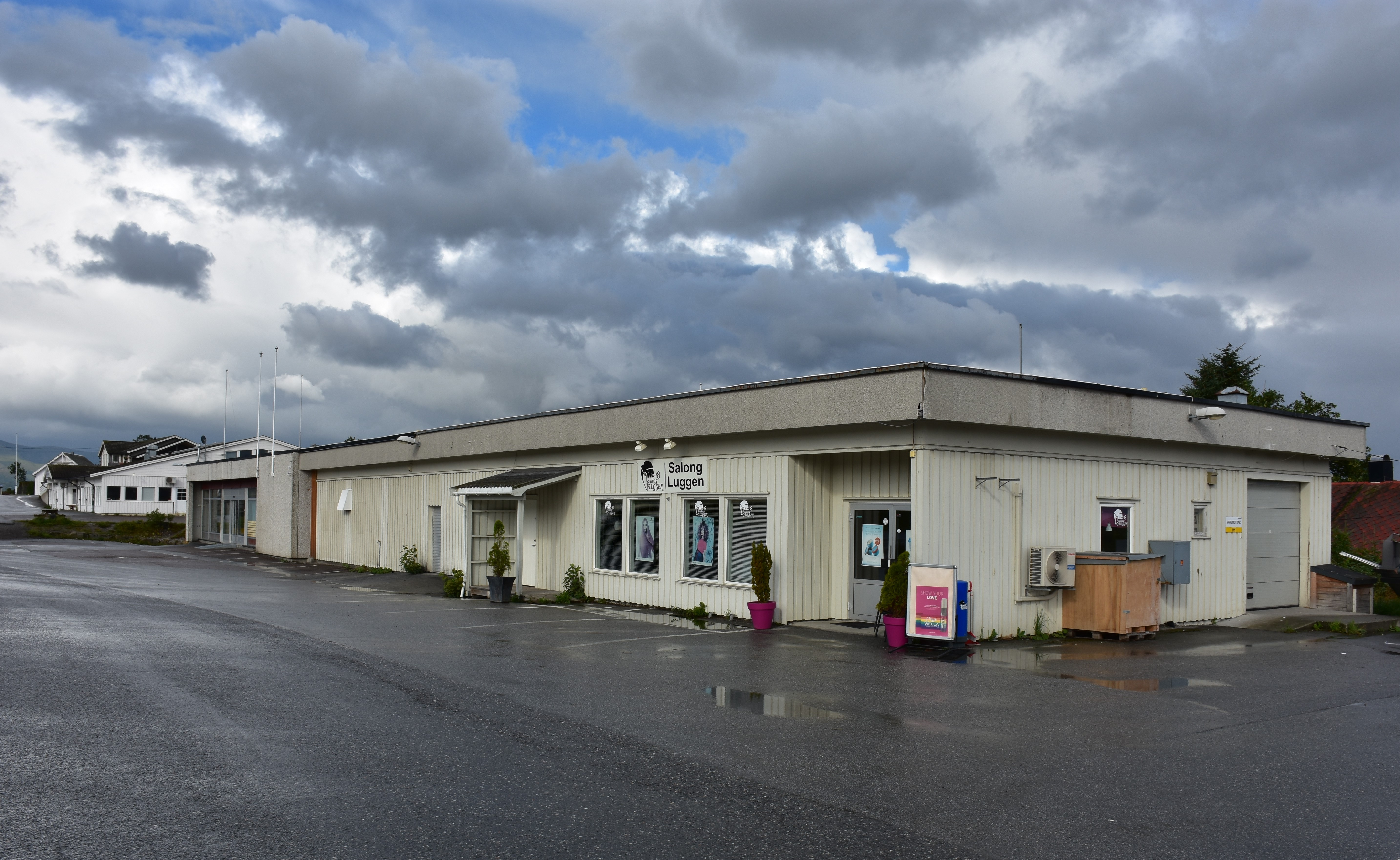 Butikker i Kårvåg på Averøya